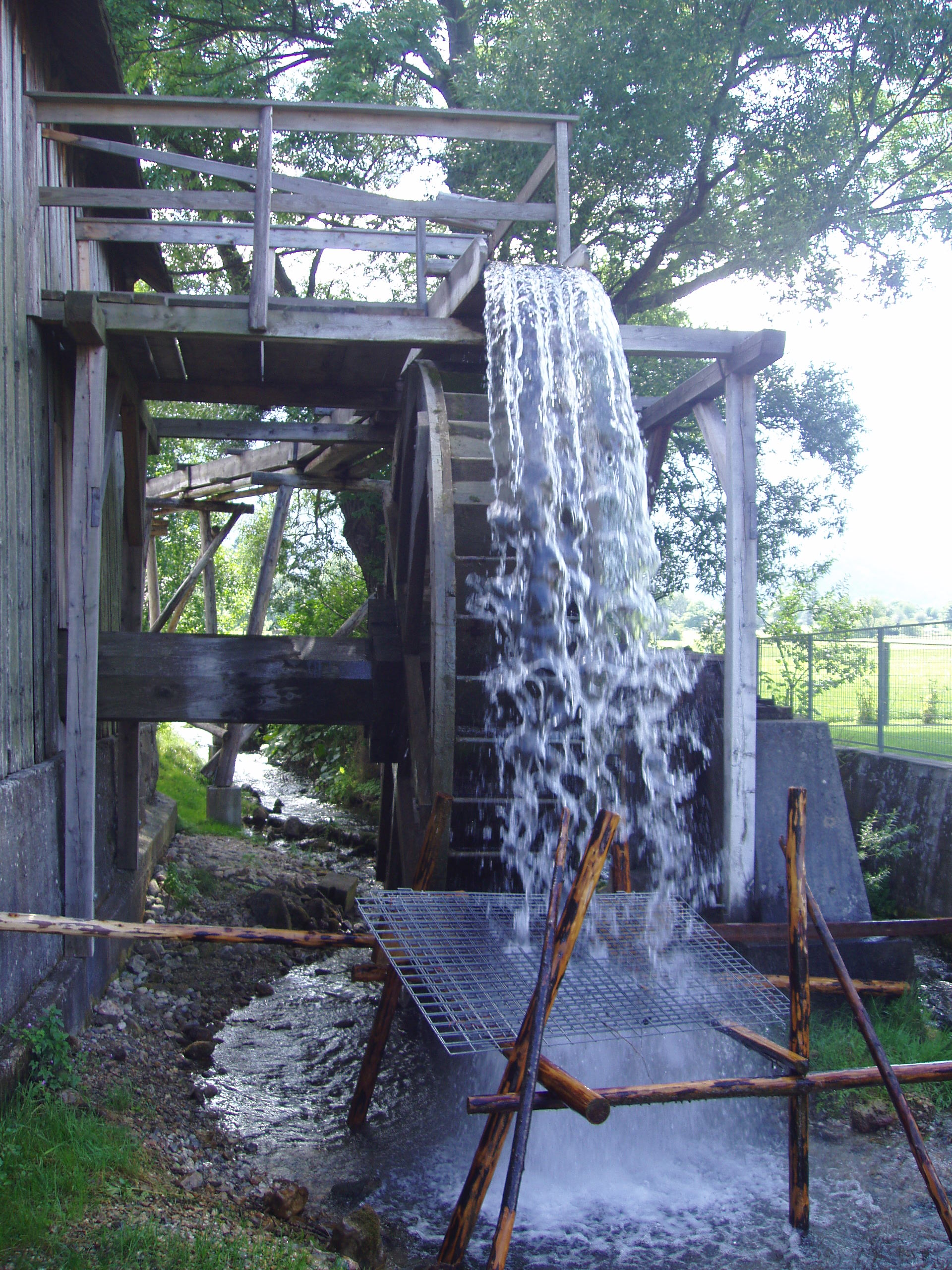 Die Schneeberger Säge in Puchberg am Schneeberg